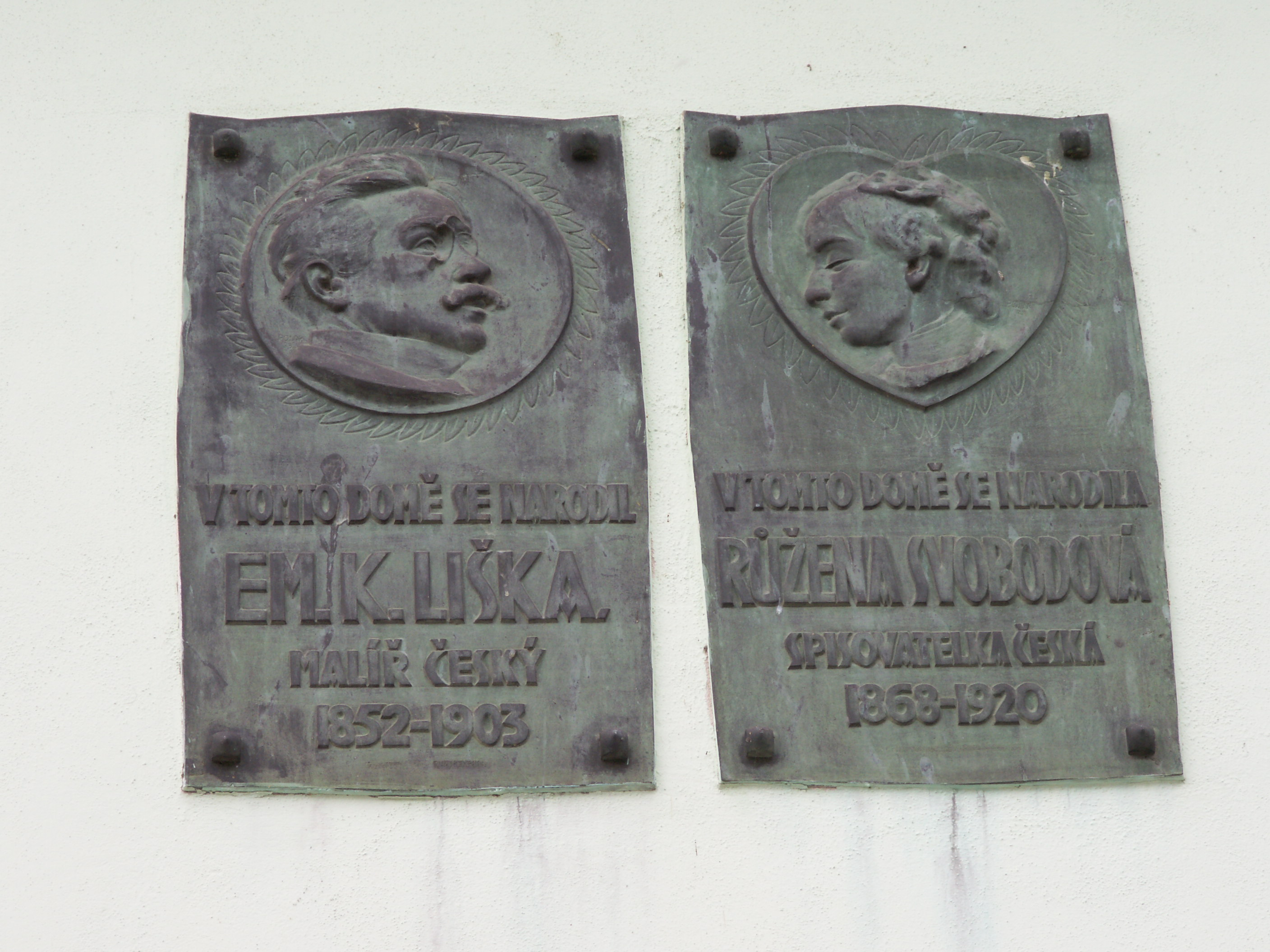 Mikulovice - pamětní desky rodákům na obecním úřadu (Svobodová, Liška)